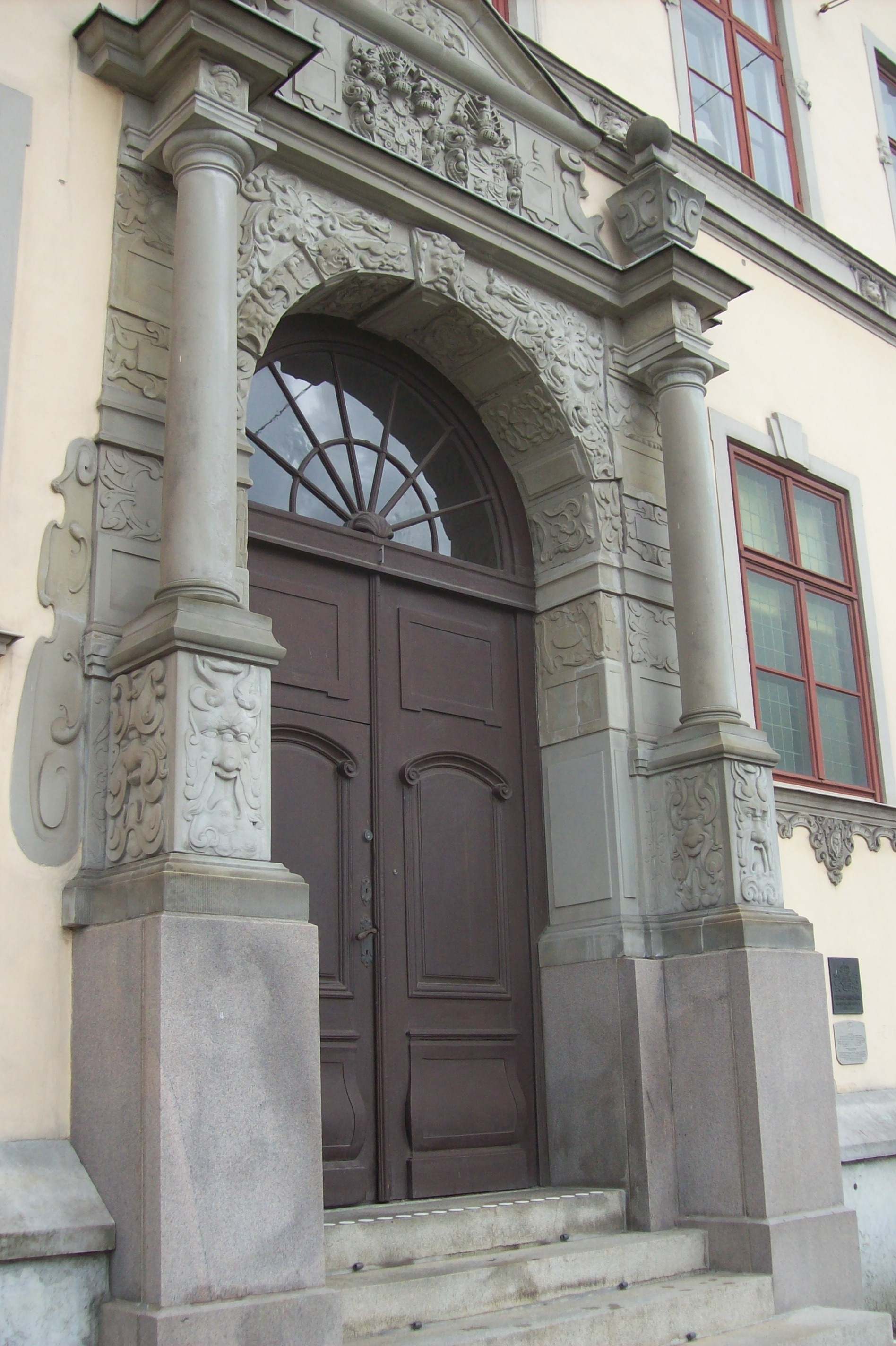 Inom vallgraven 53:16 (f.d. Residenset K:1), Länsresidenset, Göteborg, Entré.